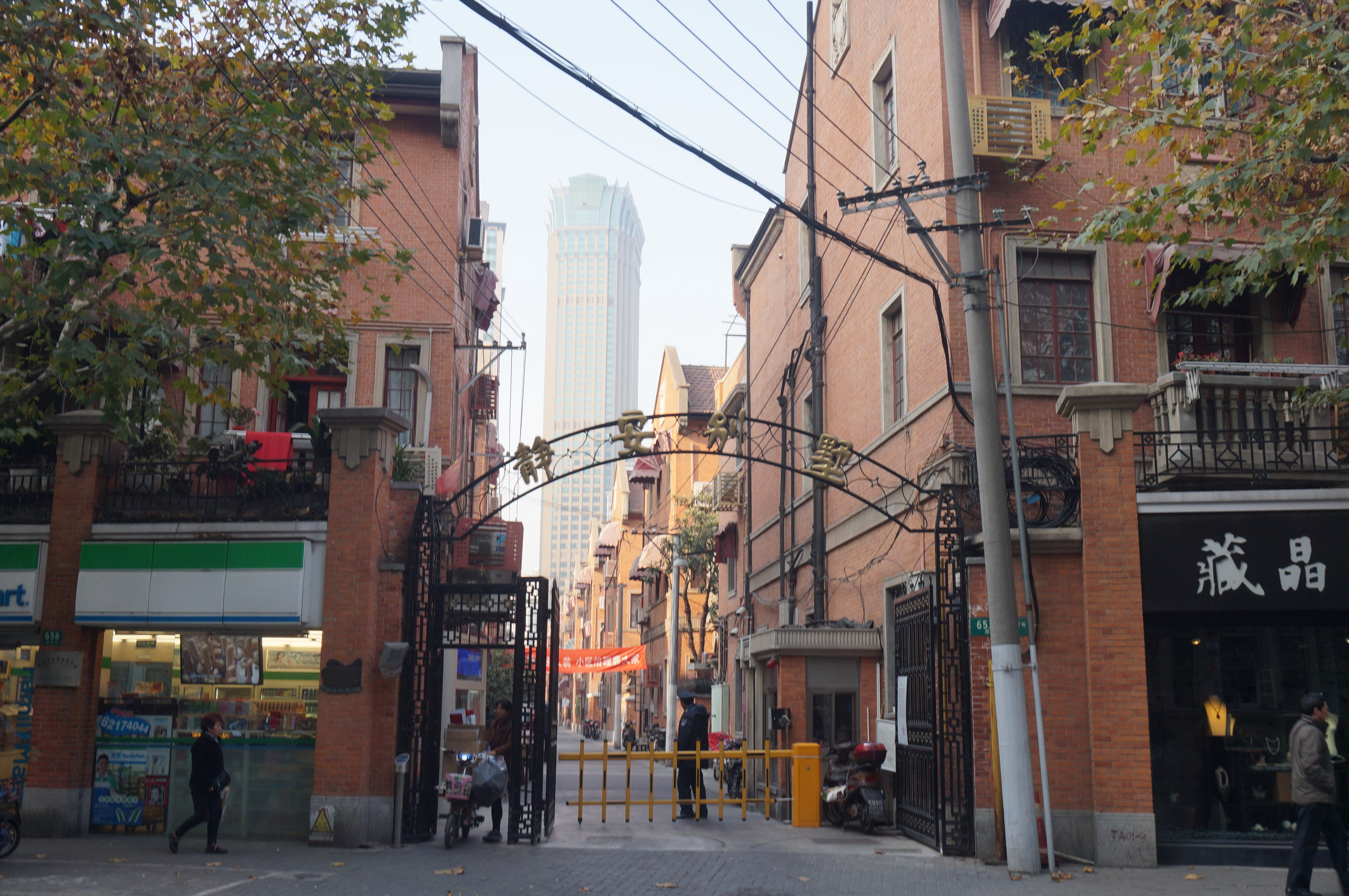 静安别墅大门